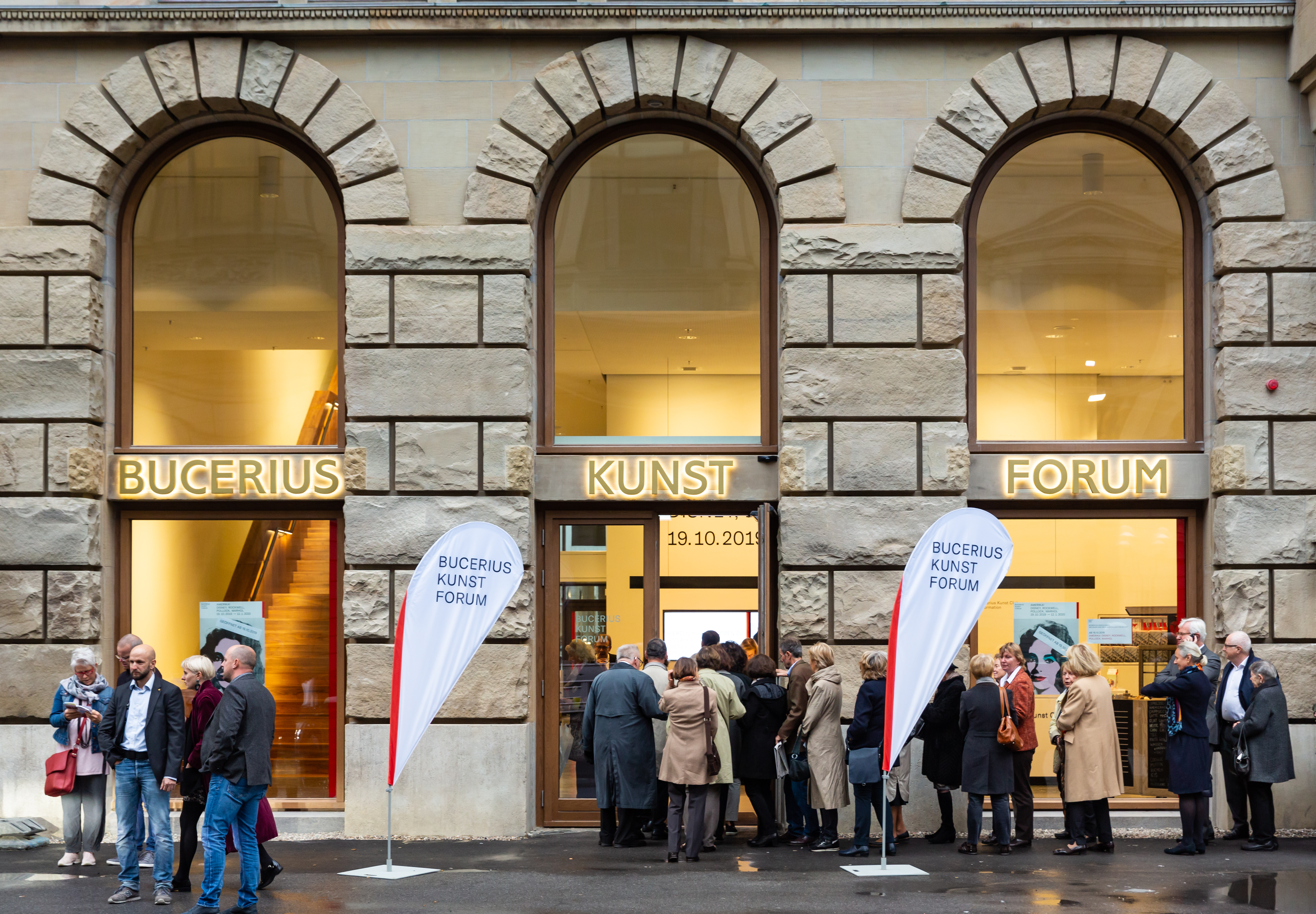 Bucerius Kunst Forum, Alter Wall